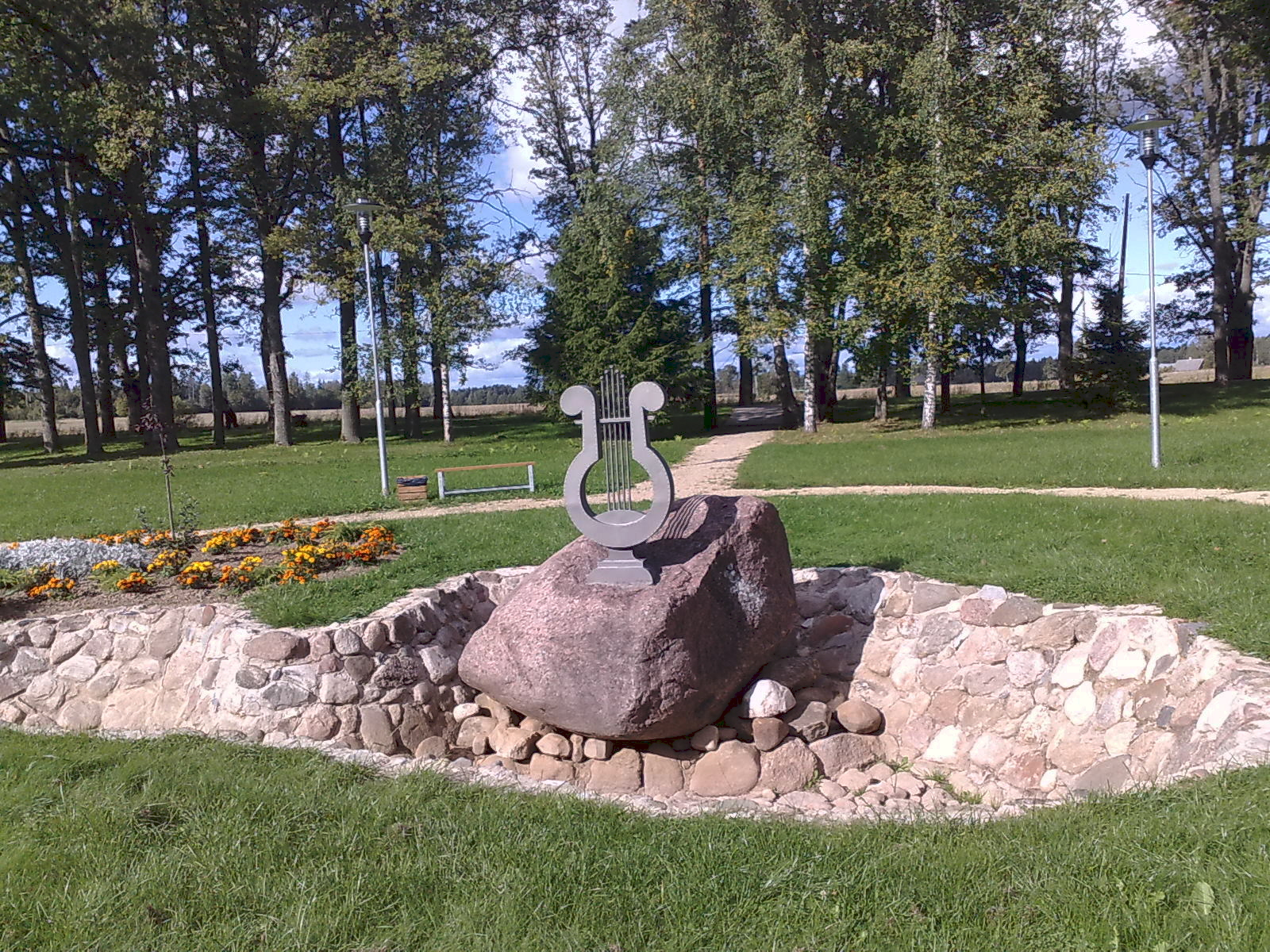 Pirmo dziesmu svētku vieta Dikļos Valmieras rajonā